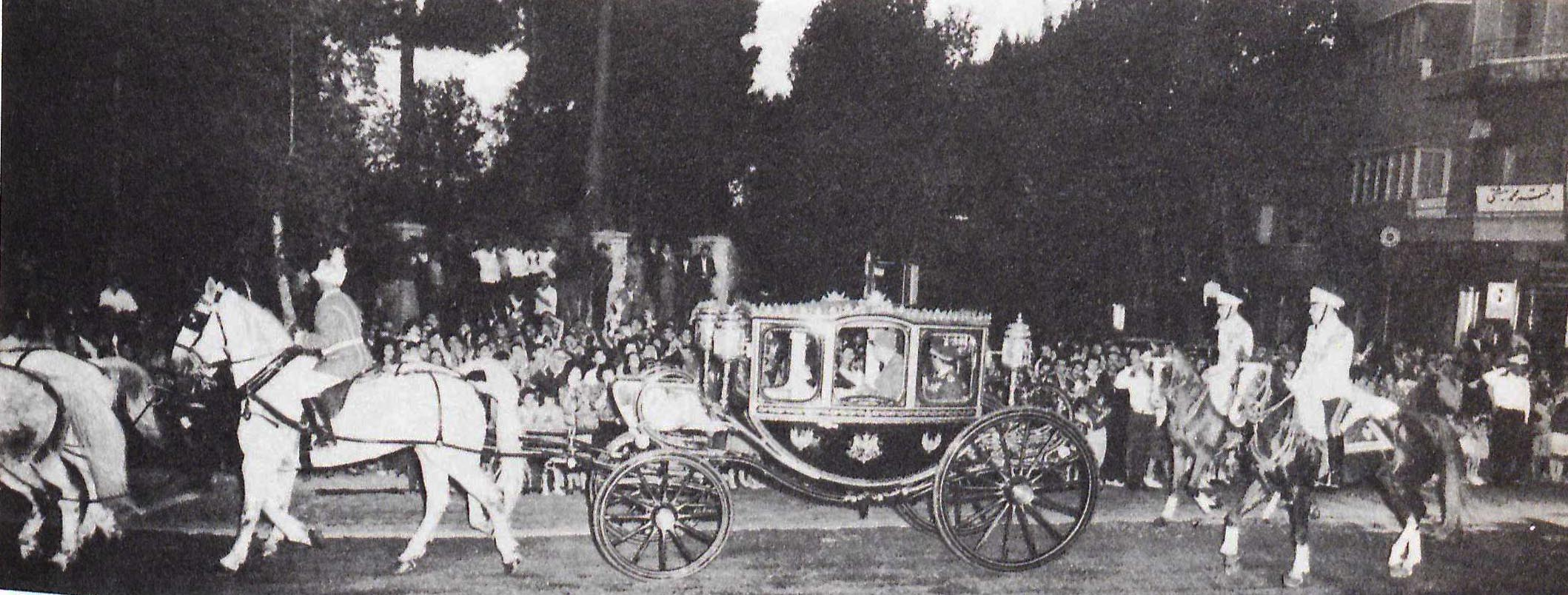 Le chah d'Iran Mohammad Reza Pahlavi paradant avec le président de la République Française Charles De Gaulle lors de la visite de ce dernier en Iran en 1963